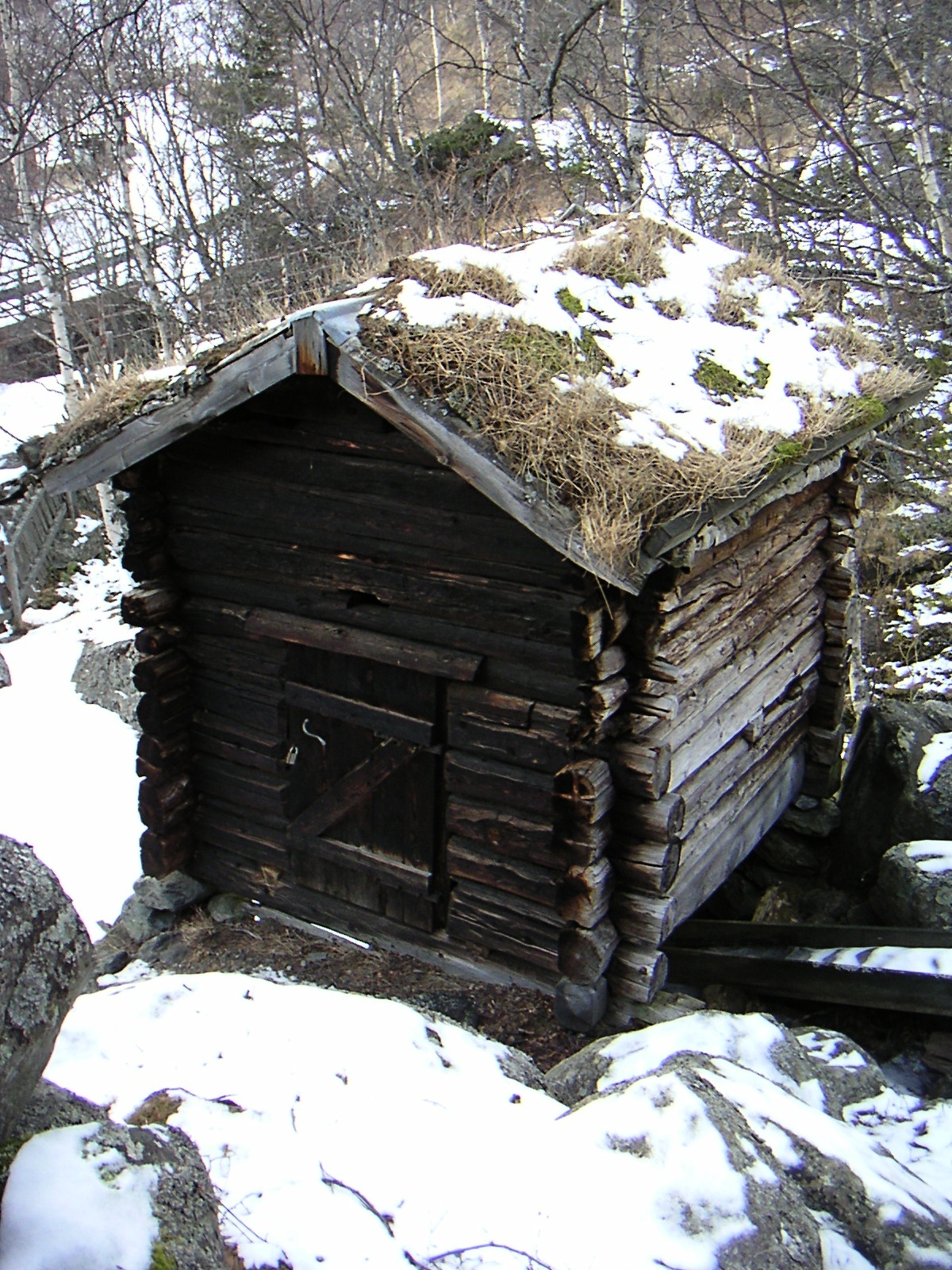 En av Leinekvernene som står ved Leineåna i Vang i Valdres.